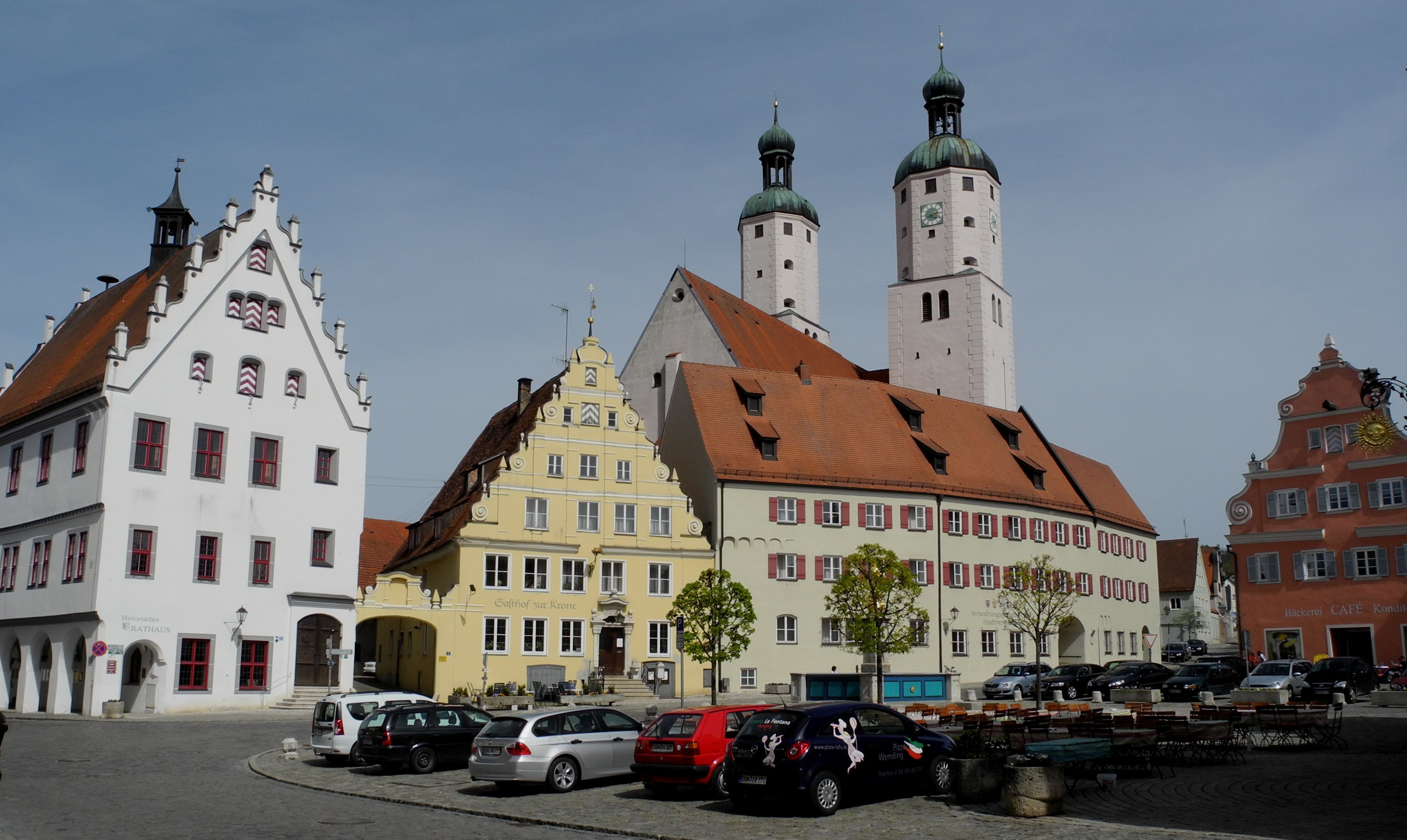 Wemding - Marktplatz mit histor. Rathaus links